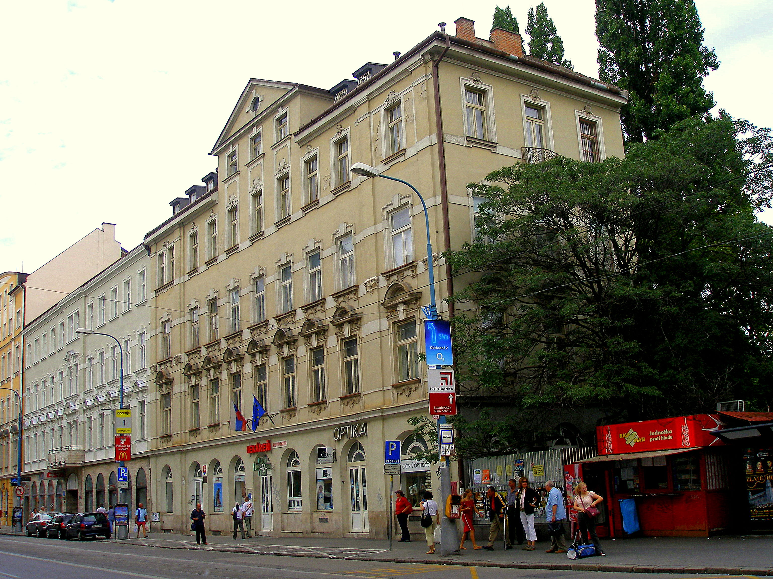 Šafárikovo námestie v Bratislave.